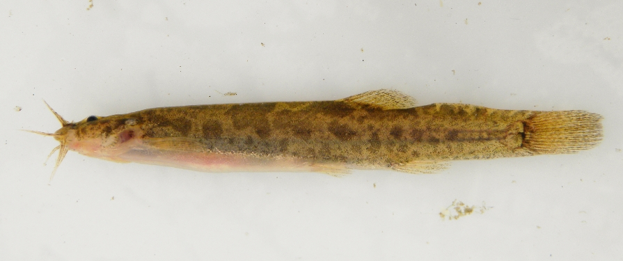 Ejemplar fotografiado inmediatamente luego de su captura.